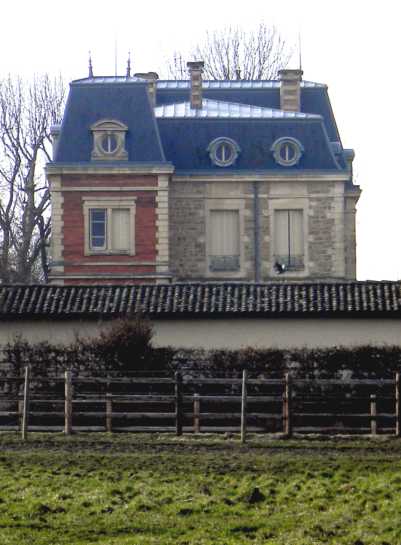 Château de Polettins vu depuis la gare de Mionnay.